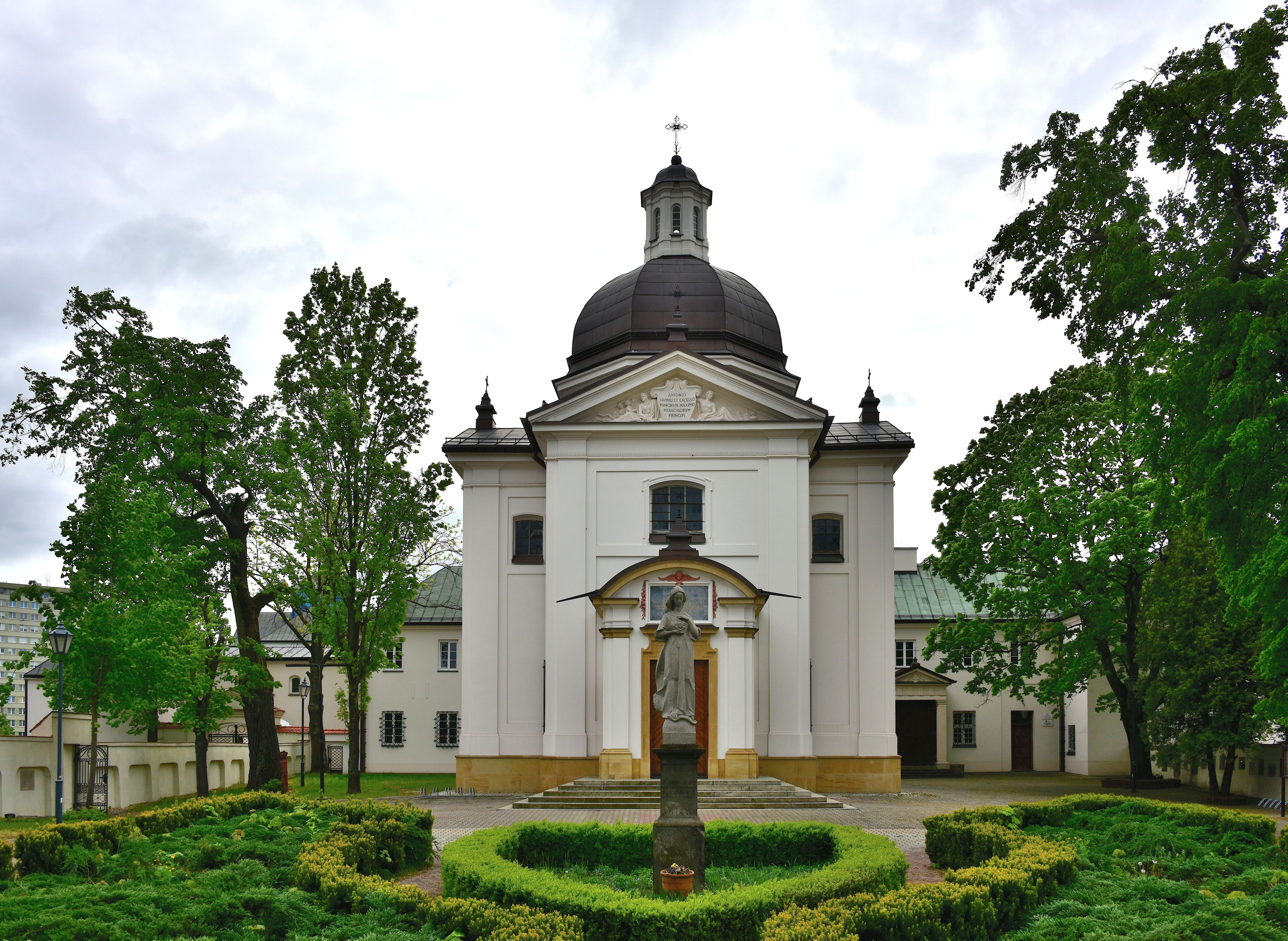 Kościół św. Antoniego Padewskiego przy ul. Czerniakowskiej w Warszawie